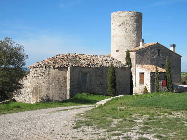 Castell de Mejanell a la Segarra - Catalunya